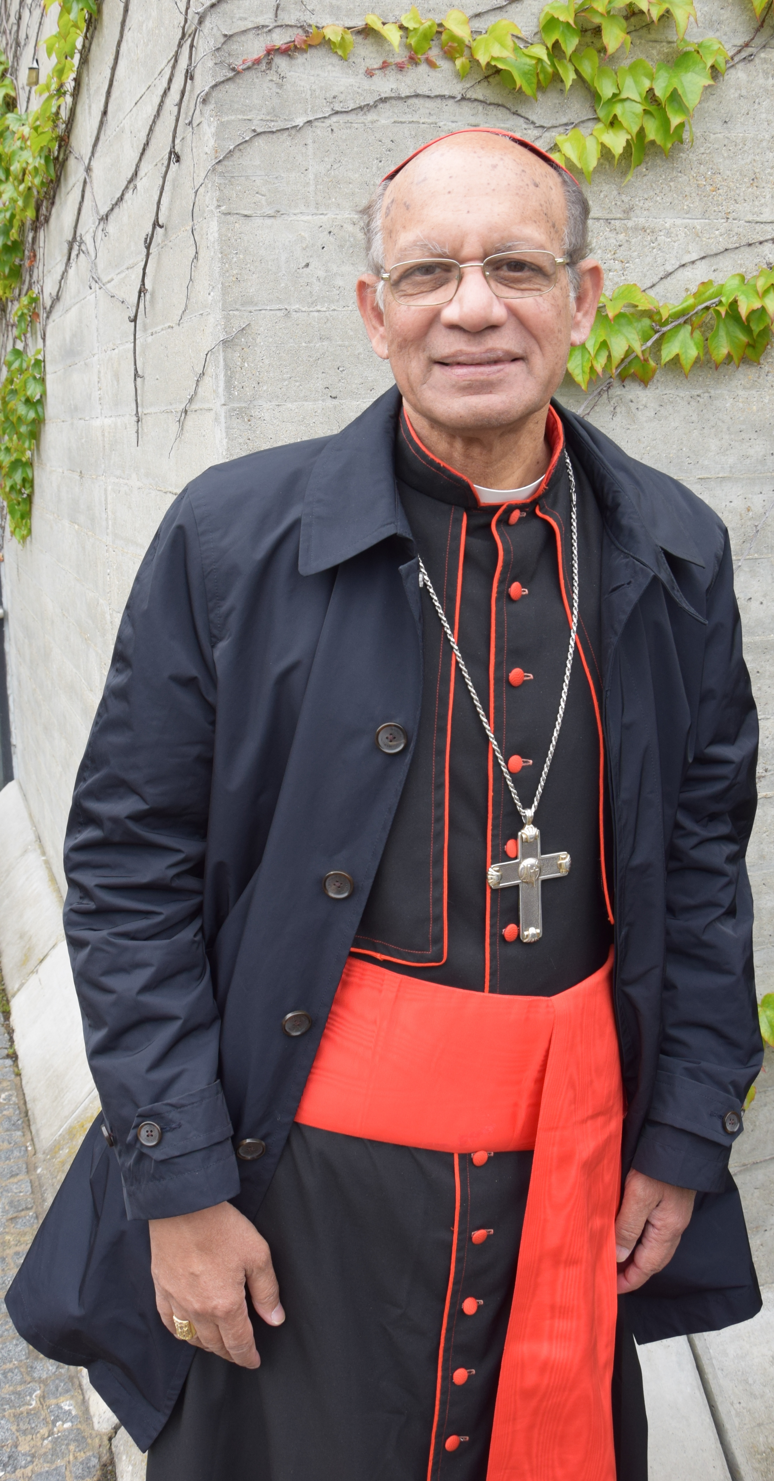 99. Deutscher Katholikentag in Regensburg